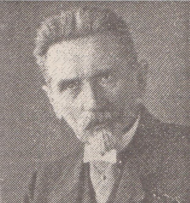 Jakab Ödön